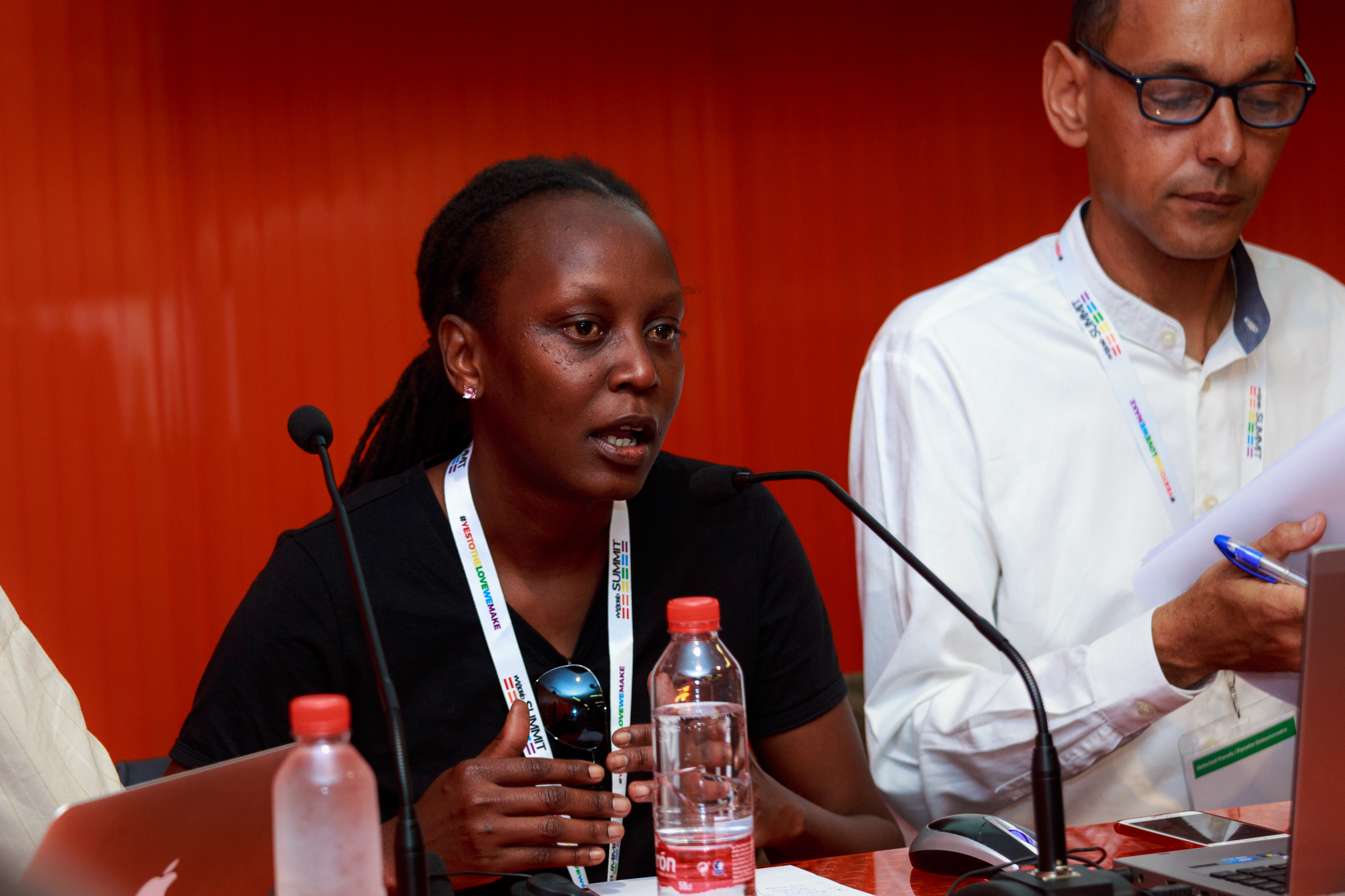 Kasha Jacqueline Nabagesera. Madrid Summit. WorldPride 2017 Madrid.